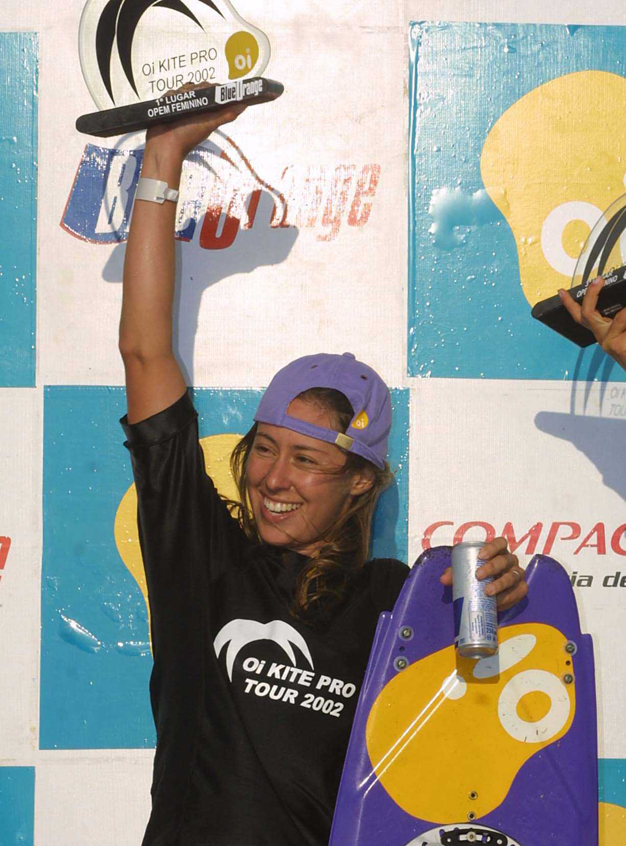 Dani Monteiro podium kitesurf